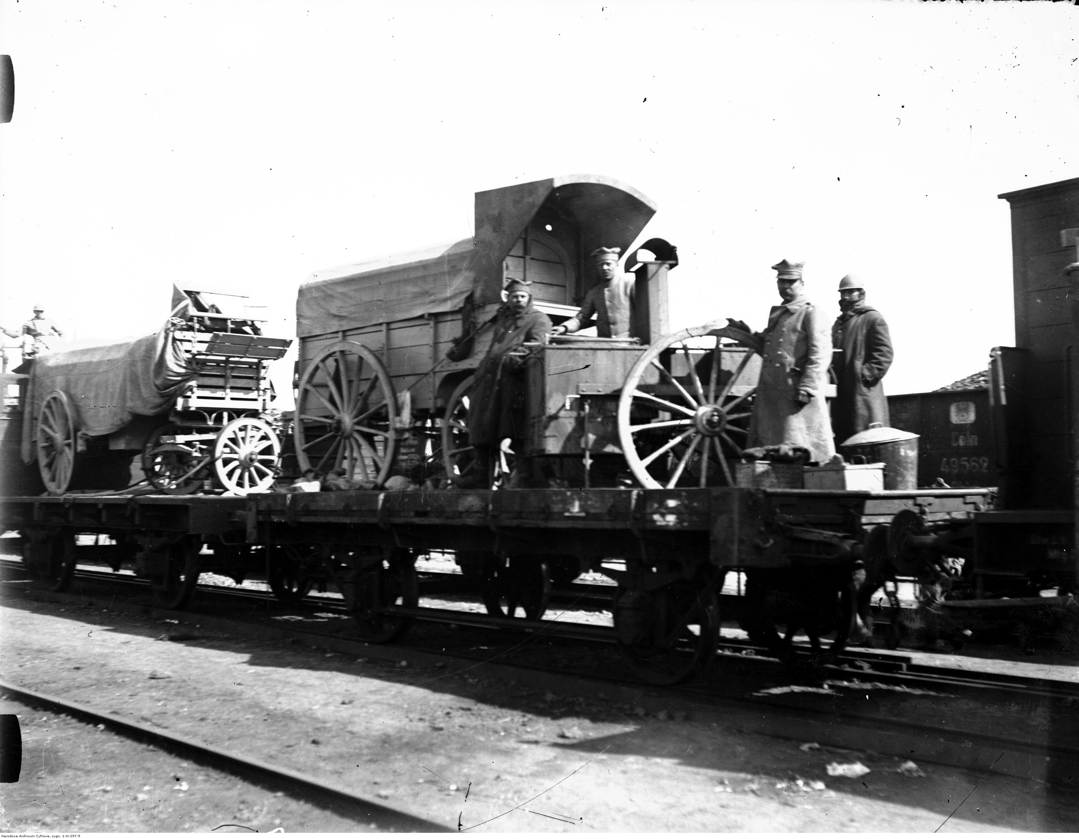 Transport oddziałów armii generała Józefa Hallera z Francji do Polski. Wojsko na platformach kolejowych do przewozu pojazdów wojskowych. Widoczna kuchnia polowa. Koncern Ilustrowany Kurier Codzienny - Archiwum Ilustracji. Sygnatura: 1-H-297-5